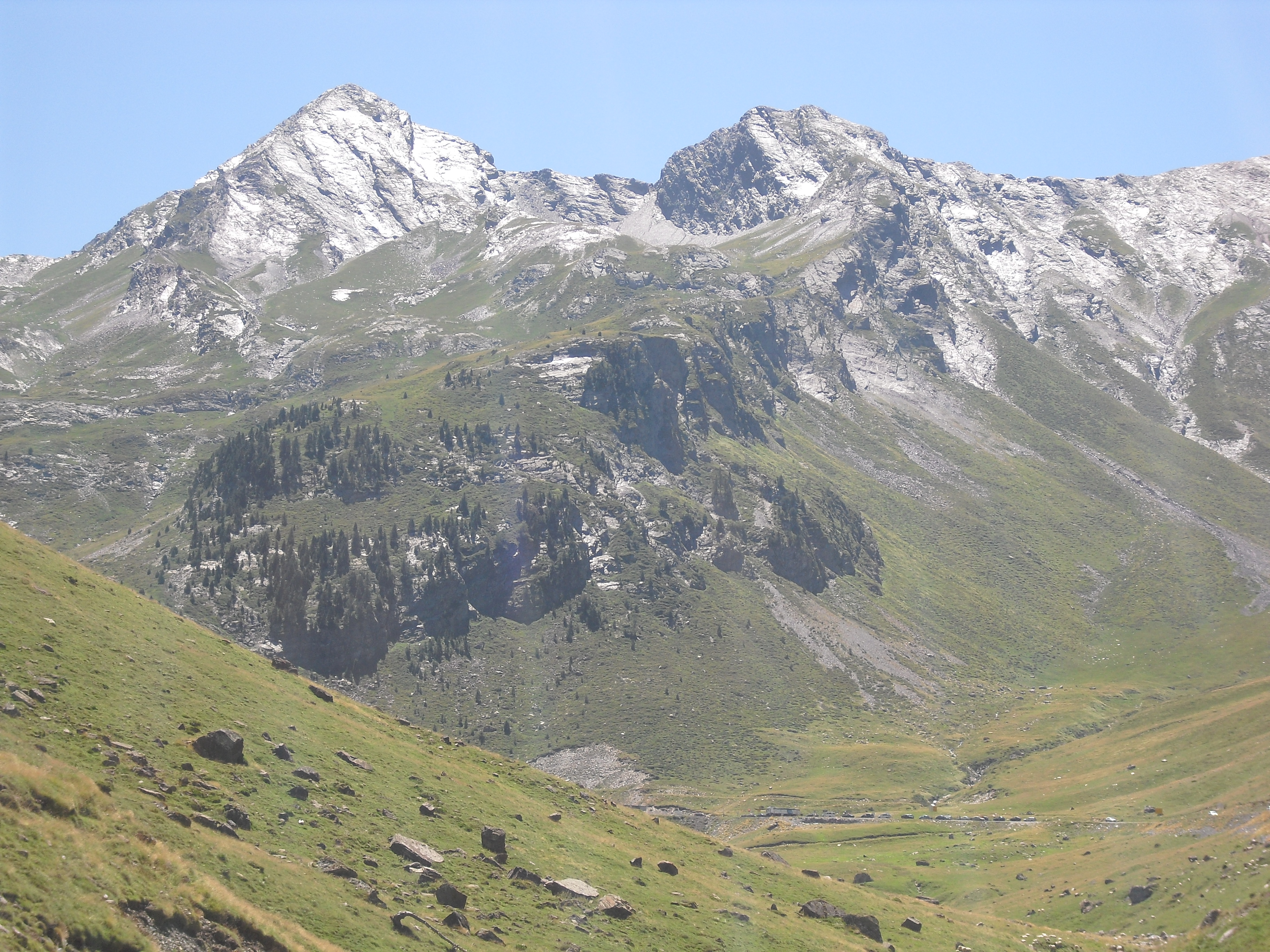 Voie d'accées au lac de Catchet à partir de la D929. Au fond, Tunnel Aragnouet Bielsa.